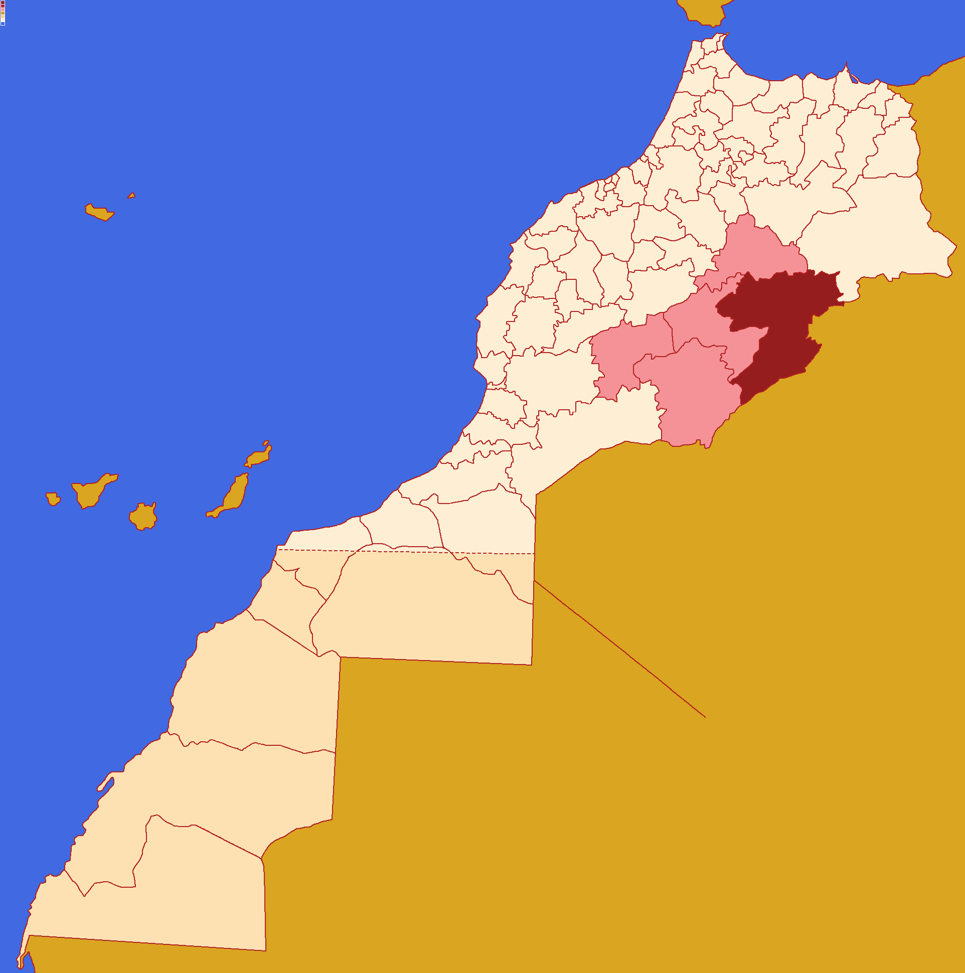 Localização da província de Errachidia ,dentro da região de Drá-Tafilete, dentro de Marrocos. Conforme a reforma admistrativa de 2015.